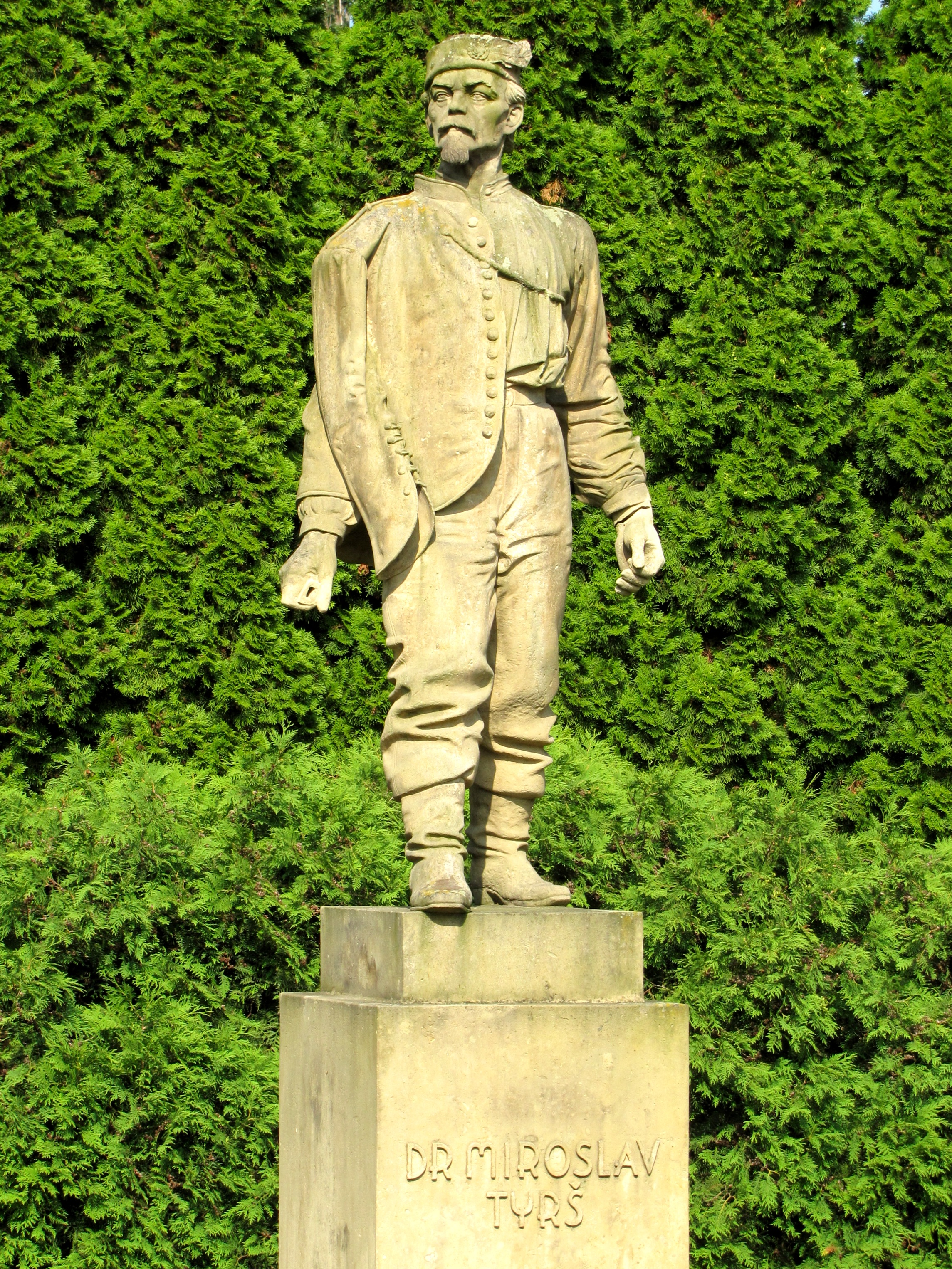 Socha Miroslava Tyrše z roku 1932 u sokolovny v Kyjově od akademického sochaře Jana Znoje